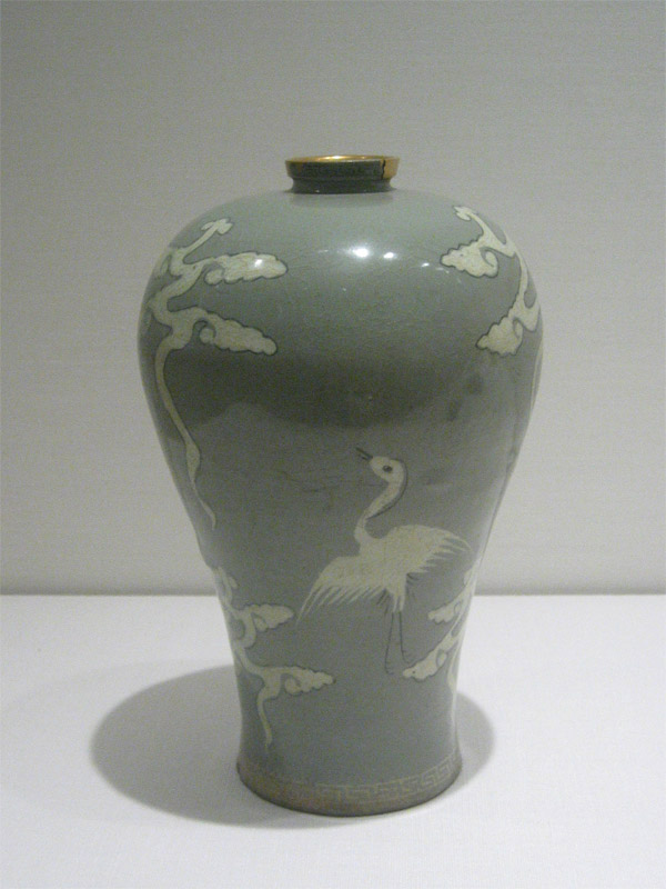 Goryeo celadon, Korea